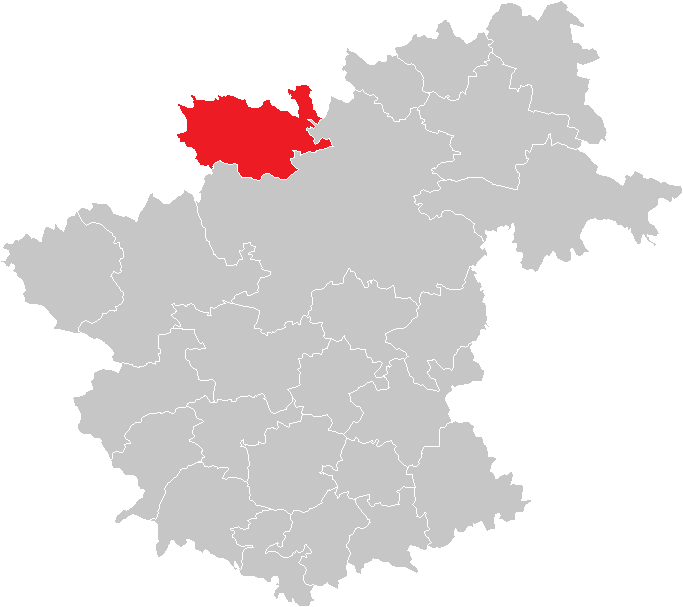 Bezirk Zwettl